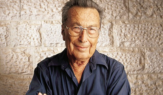 פרופסור לפיסיקה יגאל תלמי